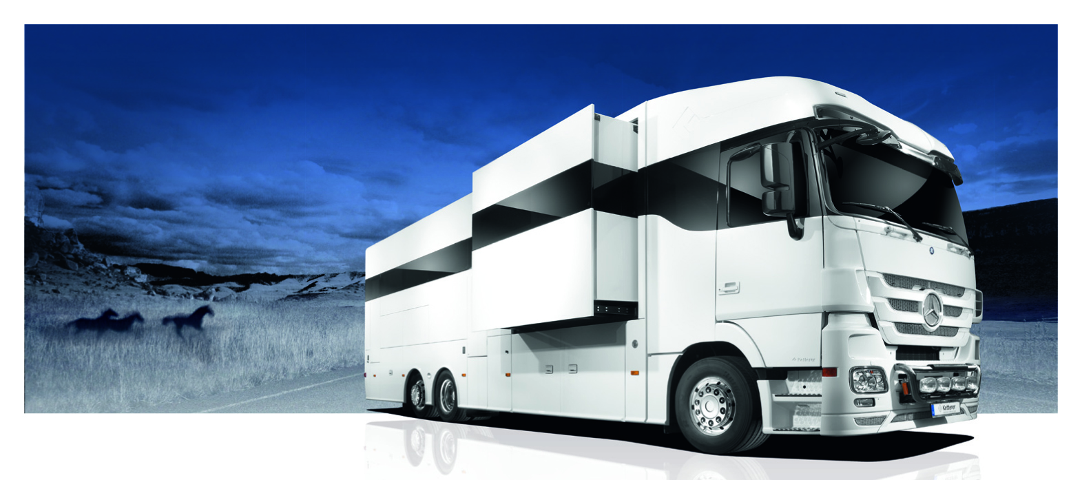 Exclusive